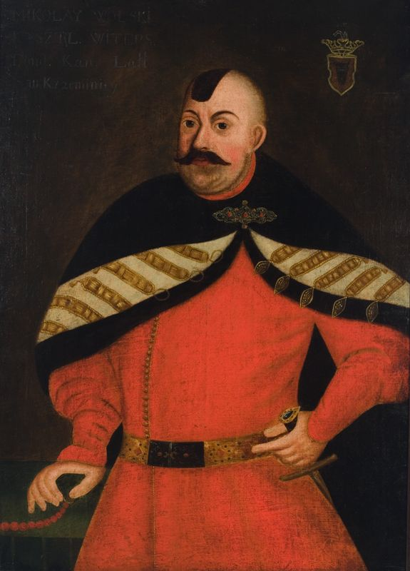 Беларуская (тарашкевіца): Партрэт Мікалая Вольскага (Mikałaj Volski), кашталяна віцебскага